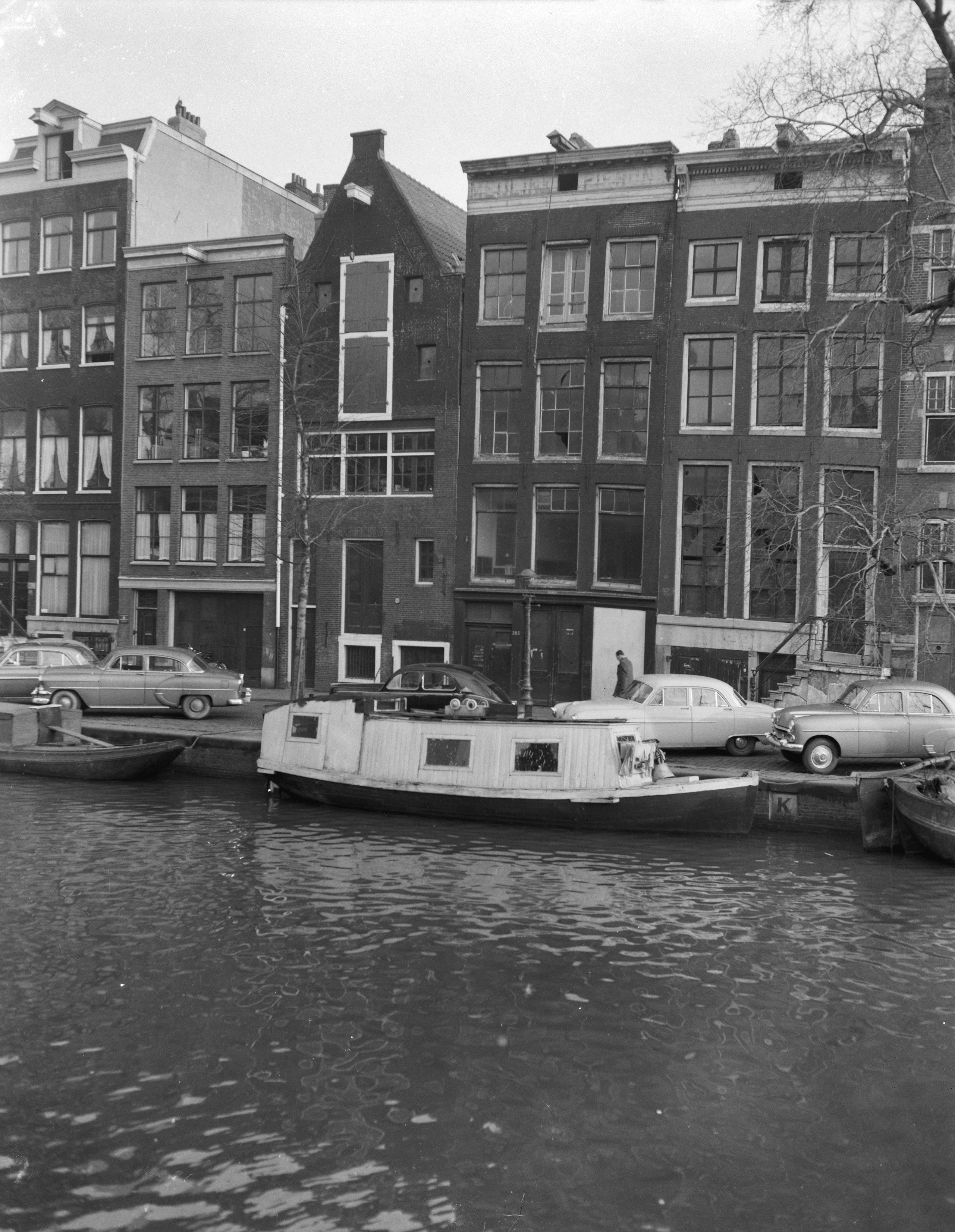 Collectie / Archief : Fotocollectie Anefo Reportage / Serie : Het achterhuis Beschrijving : Huis van Anne Frank Datum : 20 maart 1957 Locatie : Amsterdam, Noord-Holland Trefwoorden : grachtenpanden, woonhuizen Fotograaf : Rossem, Wim van / Anefo Auteursrechthebbende : Nationaal Archief Materiaalsoort : Negatief (zwart/wit) Nummer archiefinventaris : bekijk toegang 2.24.01.04 Bestanddeelnummer : 908-4126 Reacties Geplaatst door Geertje op 07 augustus 2014 - 12:20. Het pand aan Prinsengracht 263 waar o.a. Anne Frank tijdens de Tweede Wereldoorlog van 1942 tot 1944 ondergedoken heeft gezeten zal opgeknapt (gerenoveerd) worden.